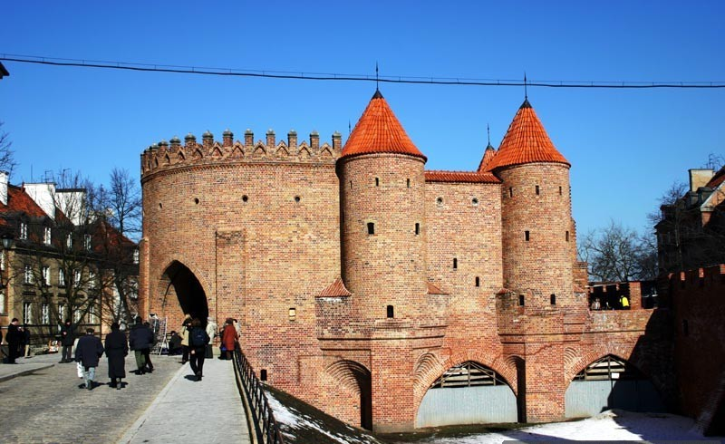 Warszawa (Polska)